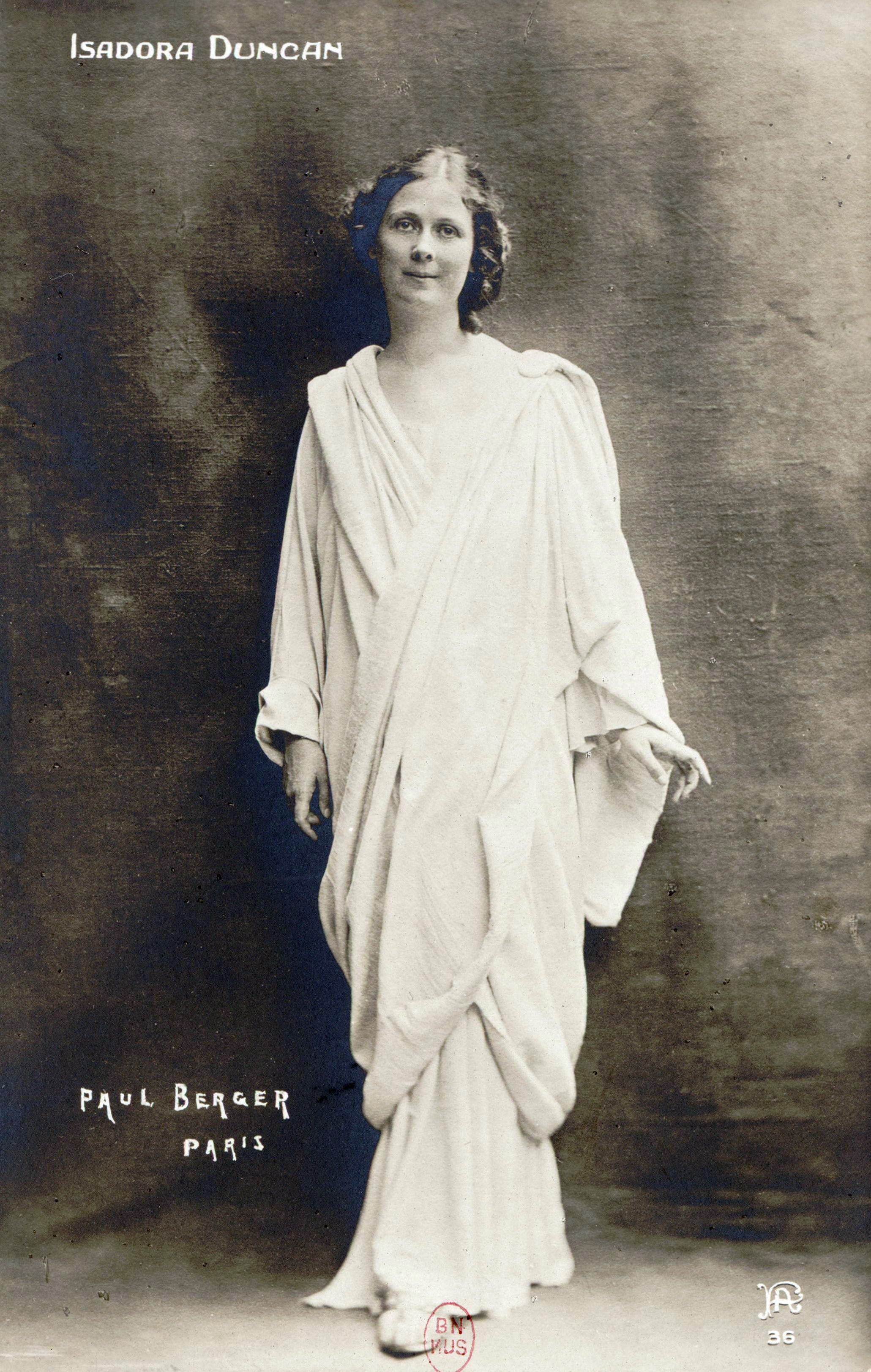 Isadora Duncan / d'après un cl. de Paul Berger